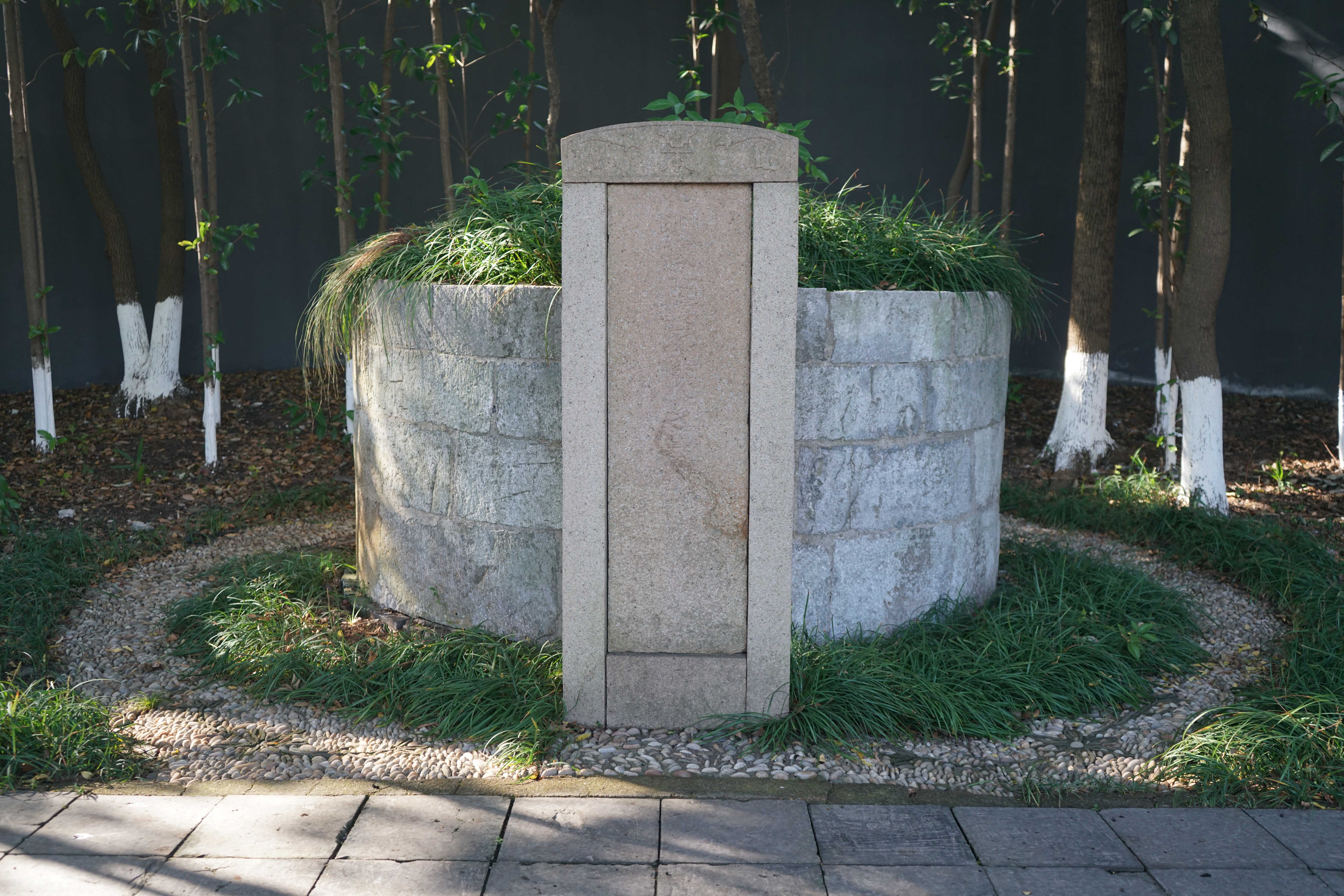 中文（中国大陆）: 江阴徐霞客墓 2